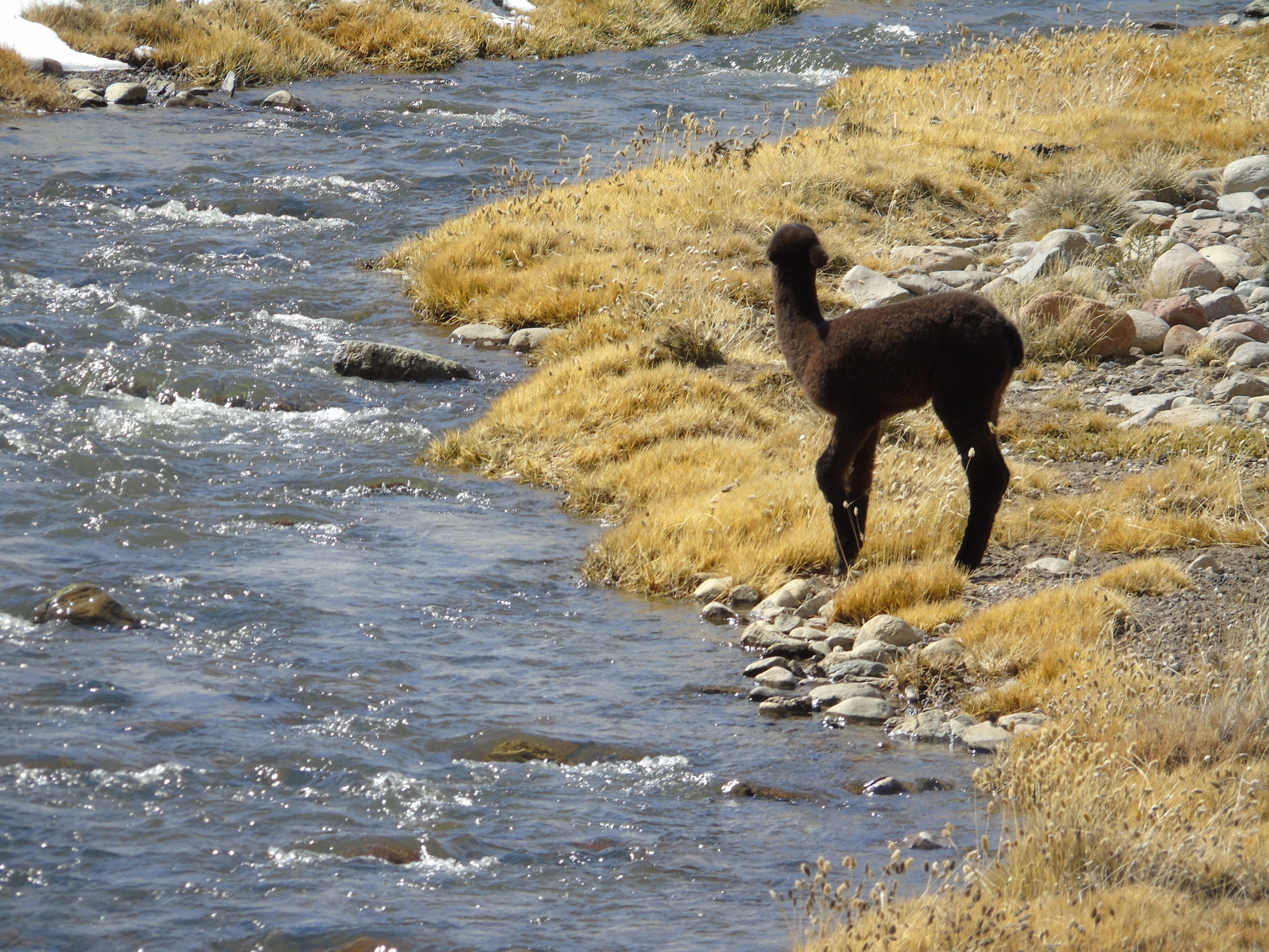 Parque nacional Lauca